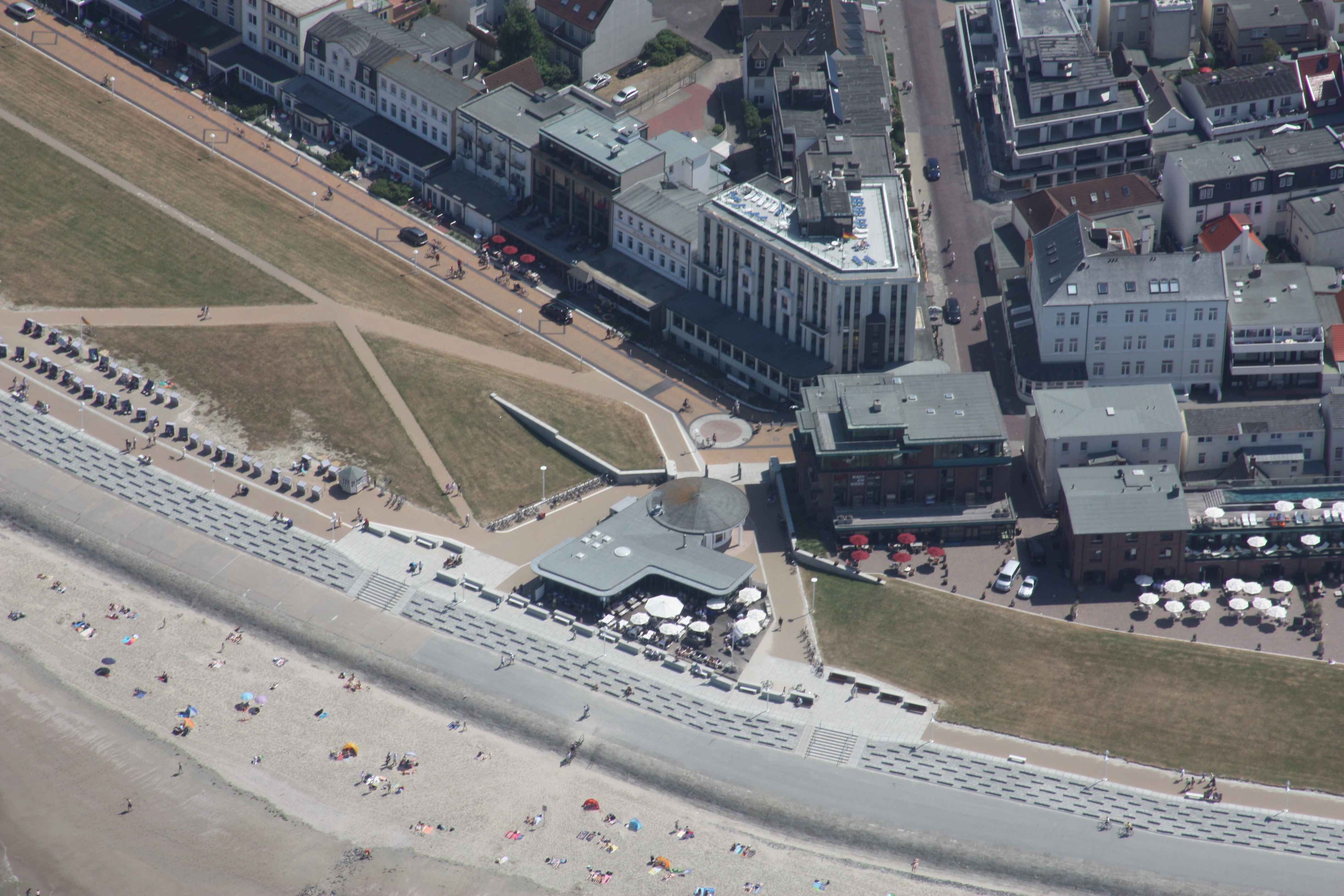 Flug über Norderney - von WEsten kommend, am Nordstran entlang; Flughöhe 500 m = 1500 ft; Juli 2010